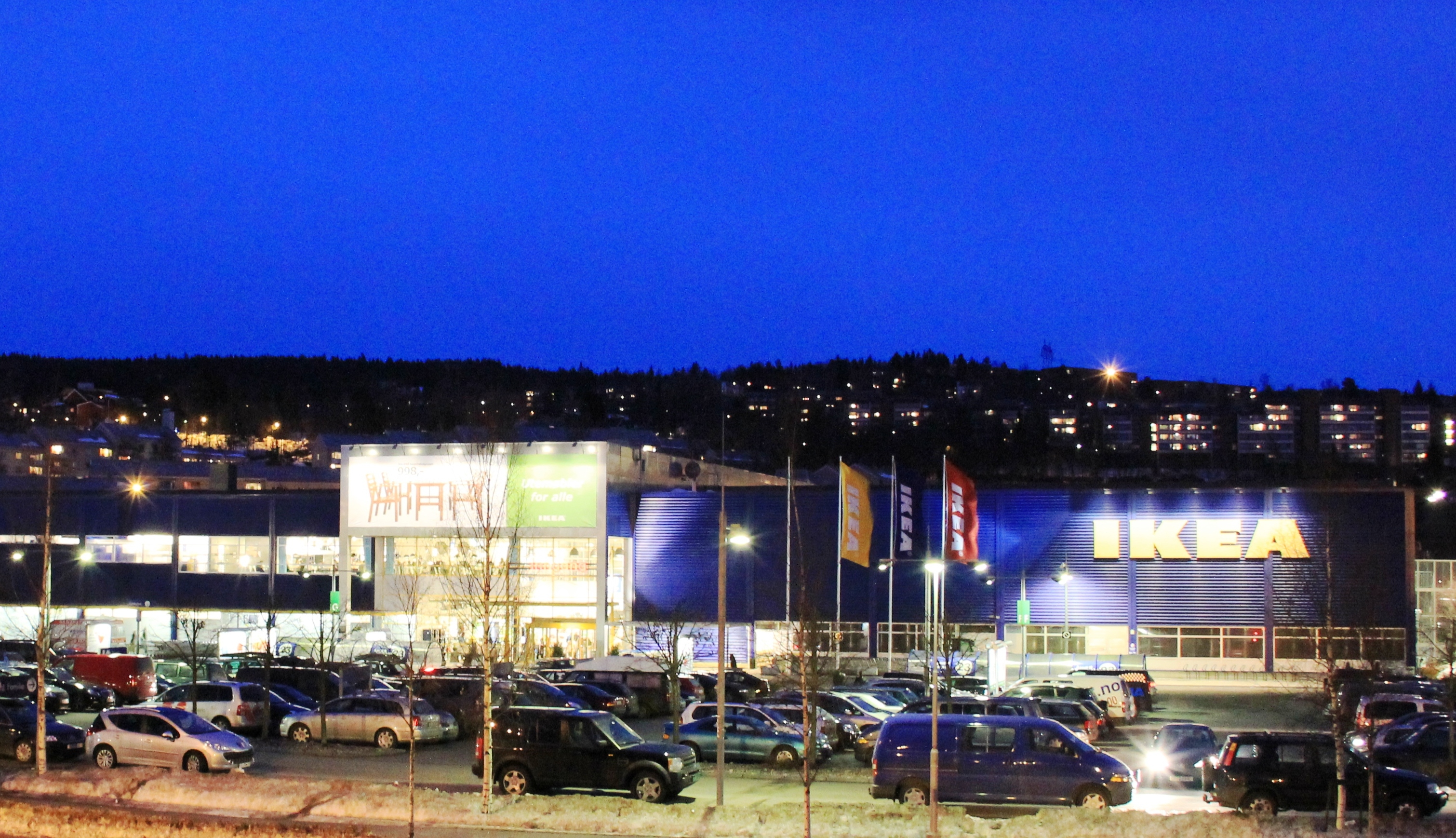 IKEA Furuset, Oslo - by night